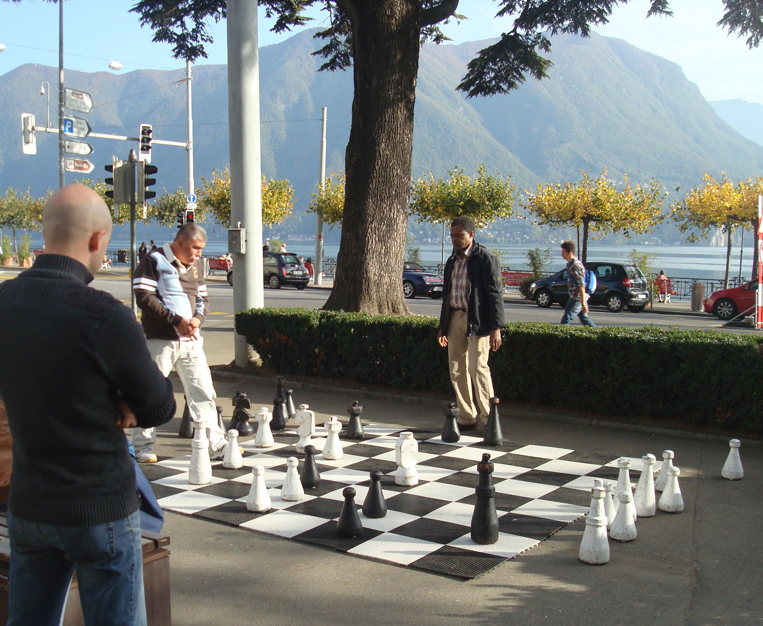 Deux joueurs d'échecs sur un échiquier géant à Lugano face au lac Riva Giacondo Albertolli